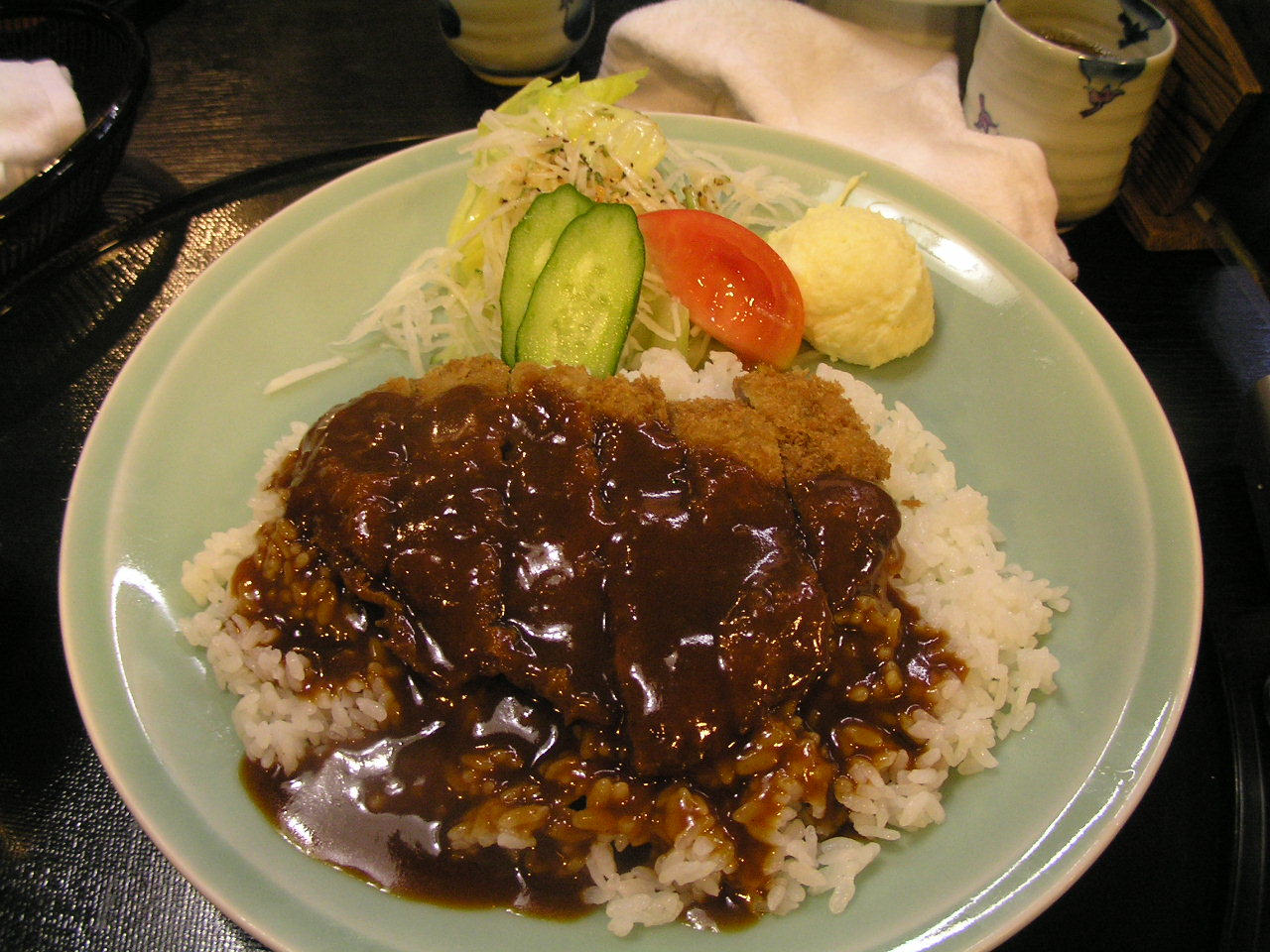 かつめし（兵庫県加古川市加古川町木村474-2、加古川駅最寄りの「味季料理 りんどう」([1])